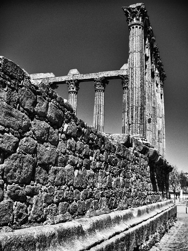 Templo de Diana, Évora This file was uploaded for Wiki Loves Monuments in Portugal with the unique identifier 11871259.